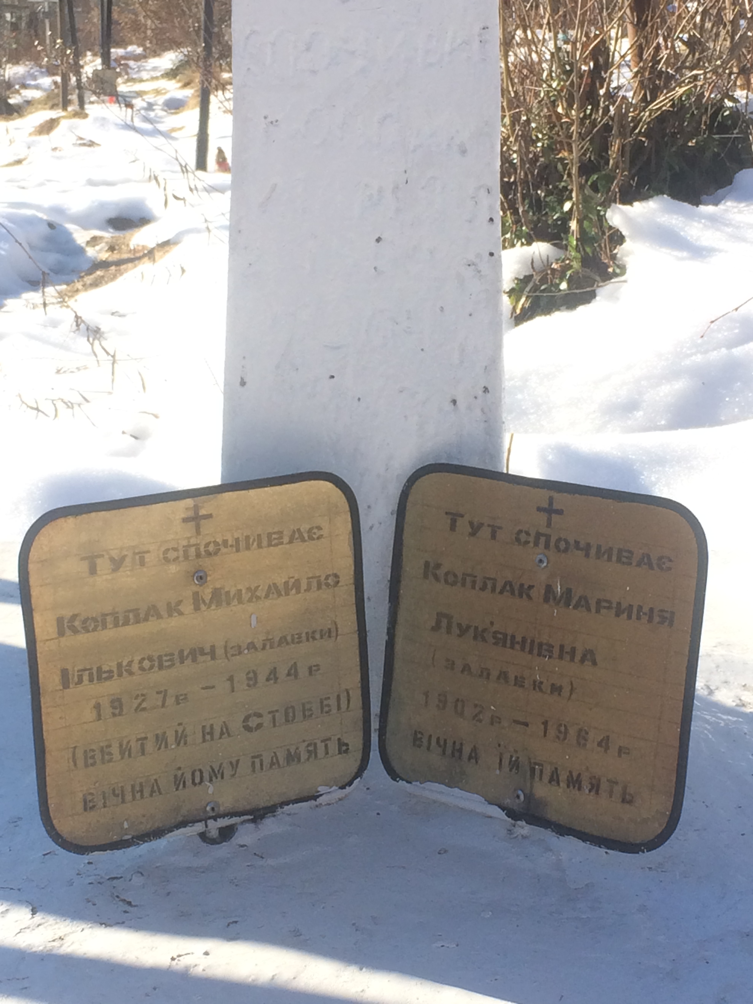 Місце поховання одного з охоронців радіостанції